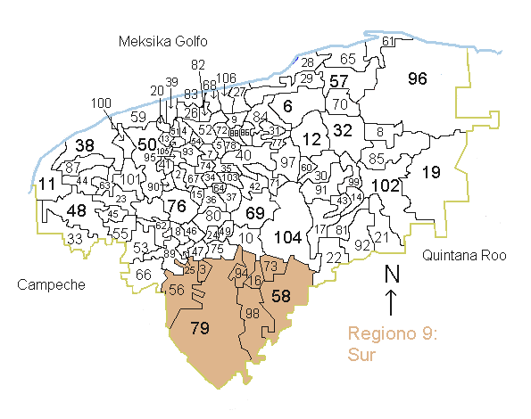 La bildo montras la situon de la regiono 9, Sur en Yucatán Kategorio:Geografio de Yucatán